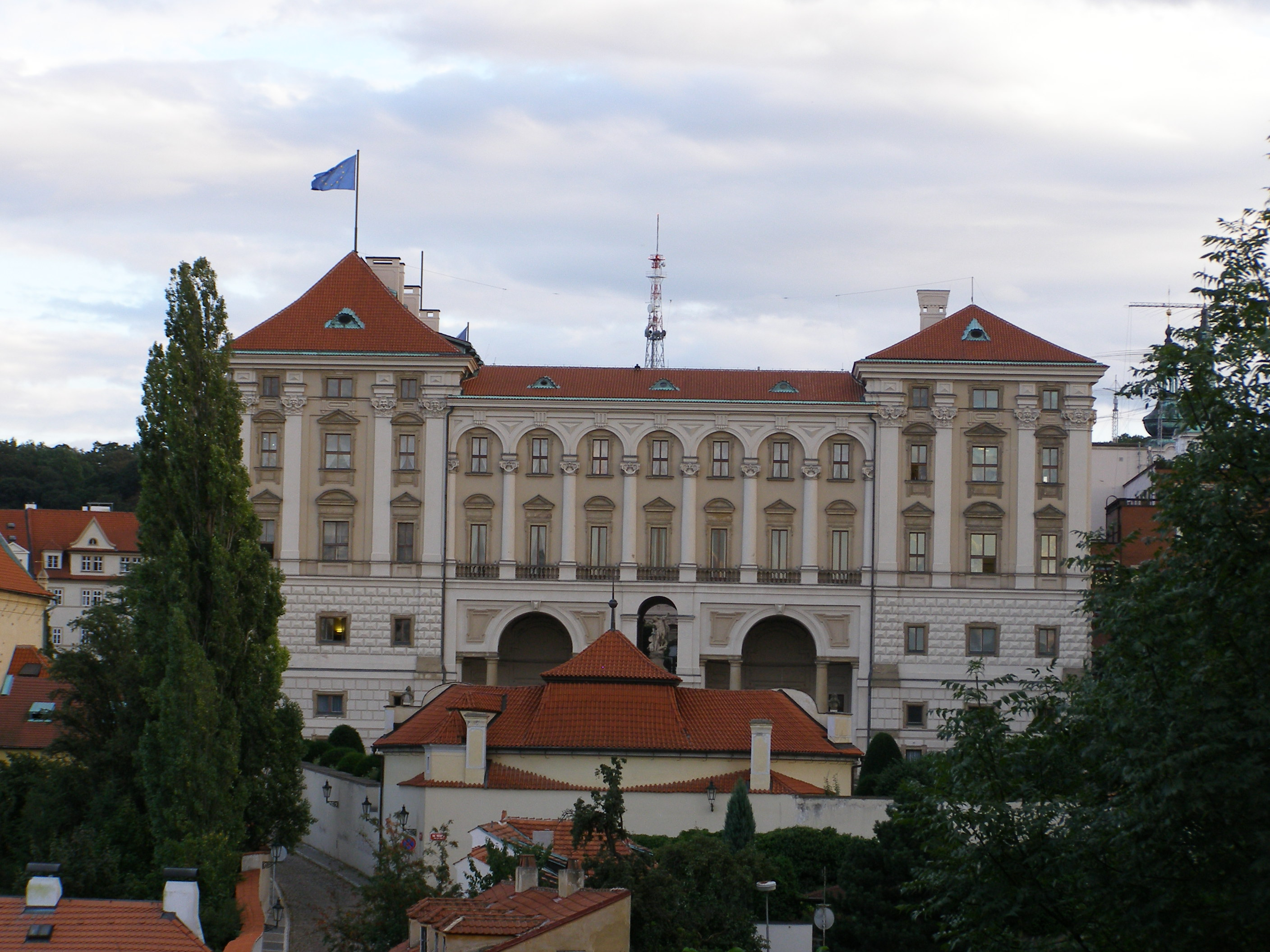 Palác Černínský (Hradčany), Praha 1, Loretánské nám. 101/5, Hradčany